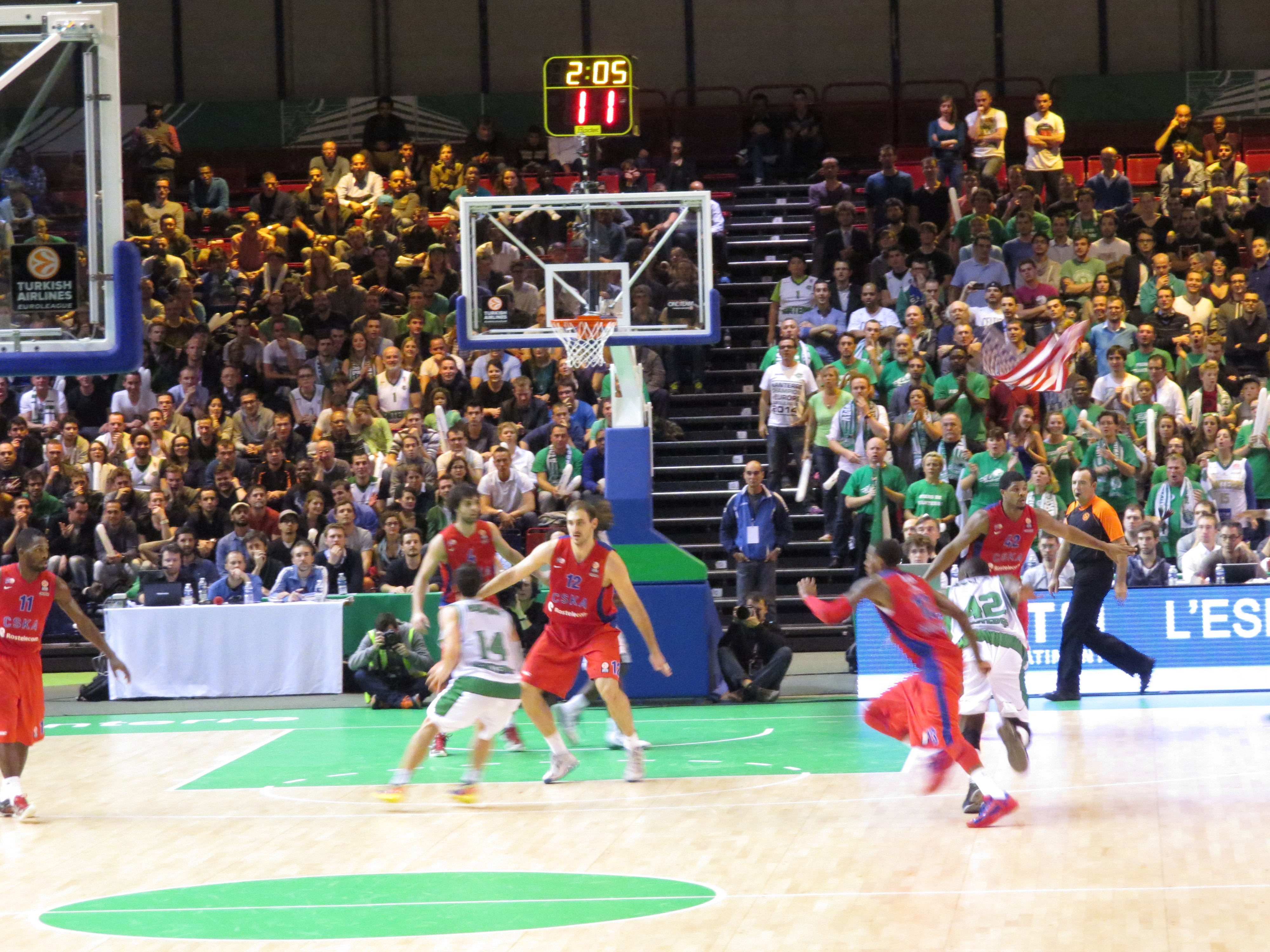 Match d'Euroligue entre Nanterre et le CSKA Moscou à la halle Carpentier (Paris). Victoire du CSKA 62-59.